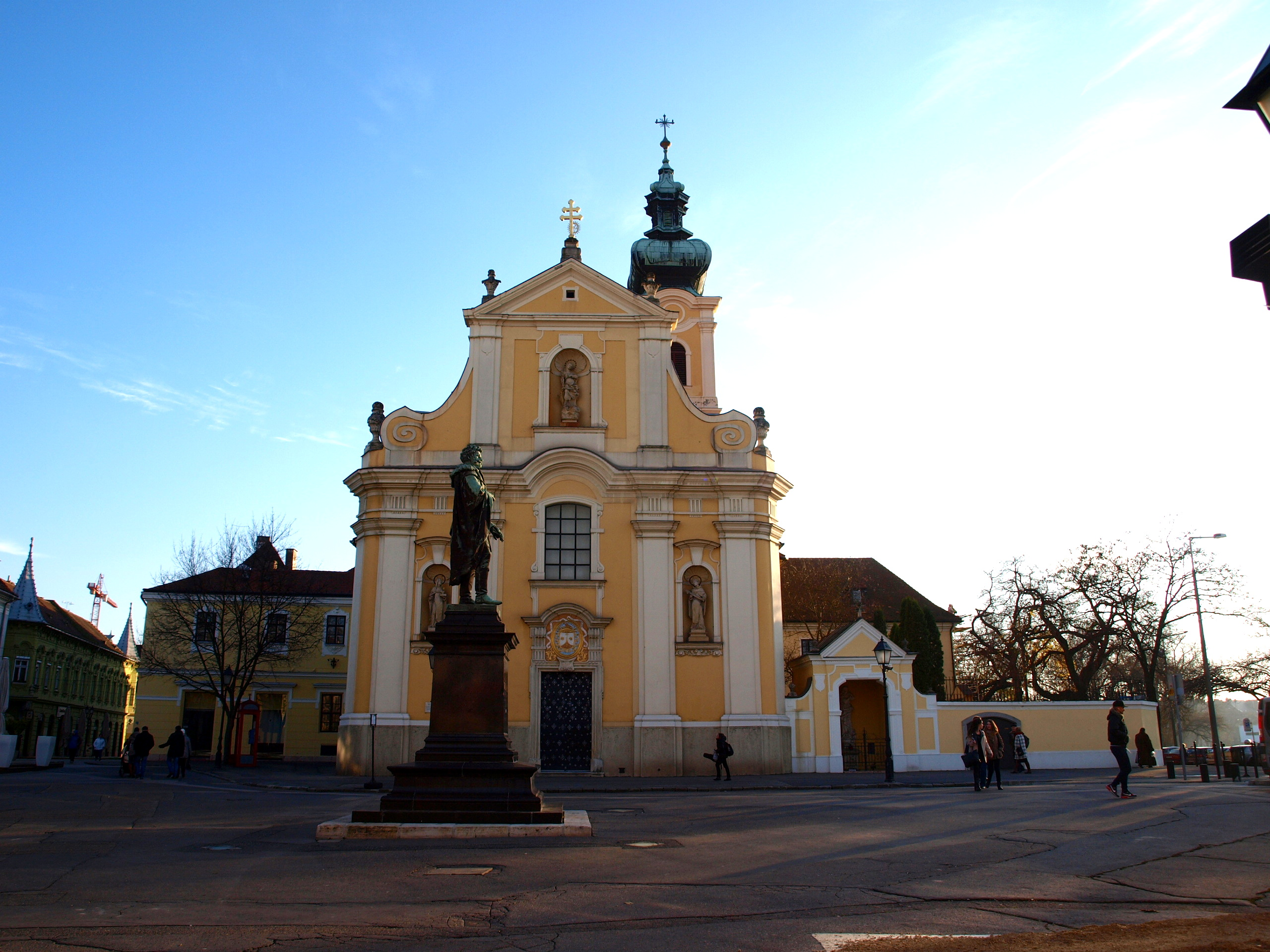 Győr kostel